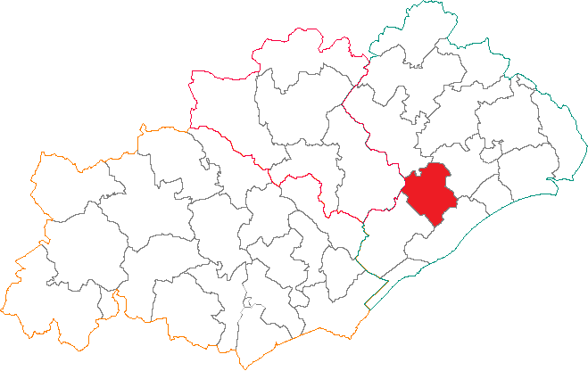 Situation du canton dans le département de l'Hérault.